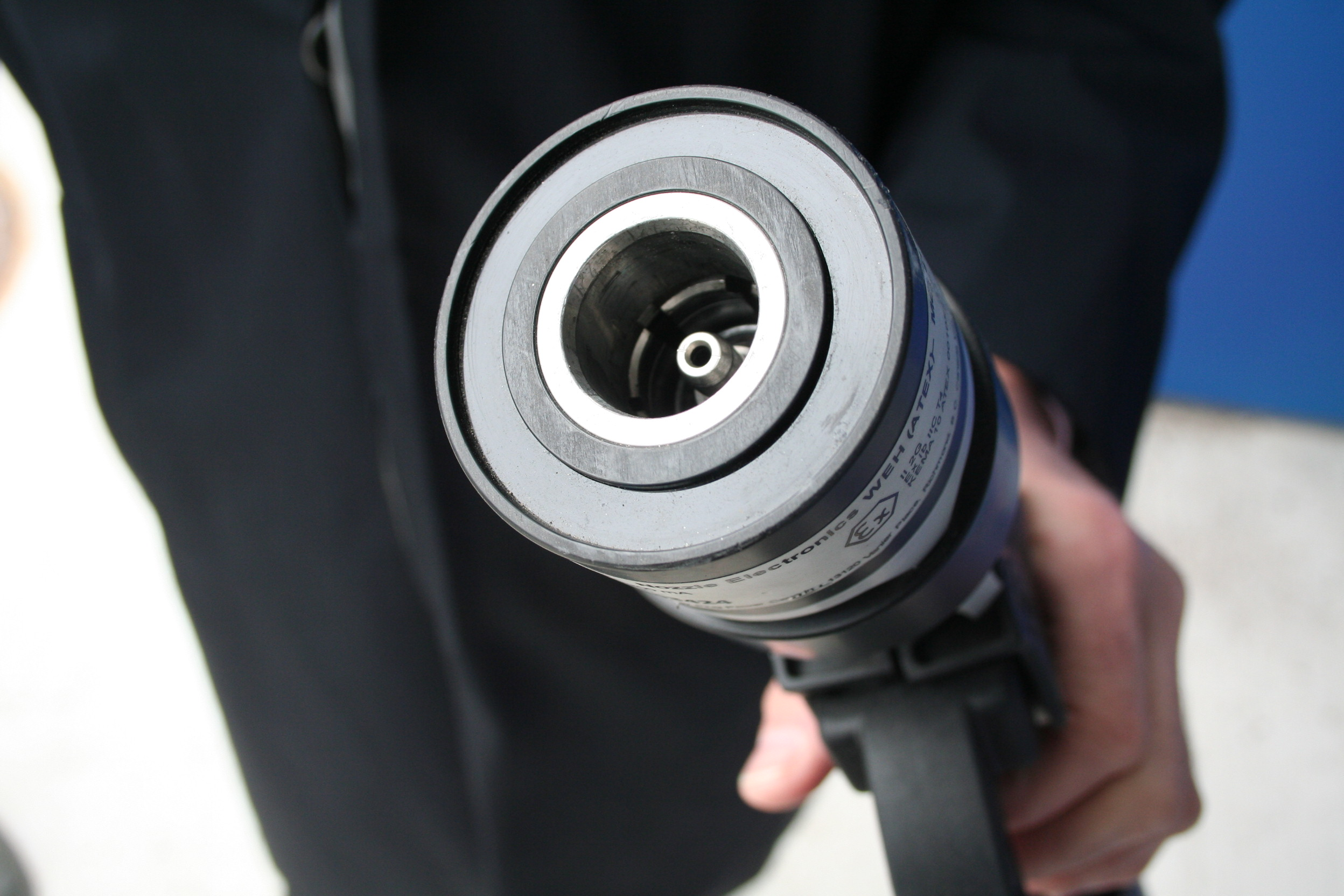 Wasserstofftankstelle der Energie Baden-Württemberg AG (EnBW) in Karlsruhe. Tankstutzen.